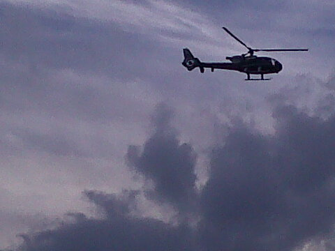 IMG00602-20110130-1639